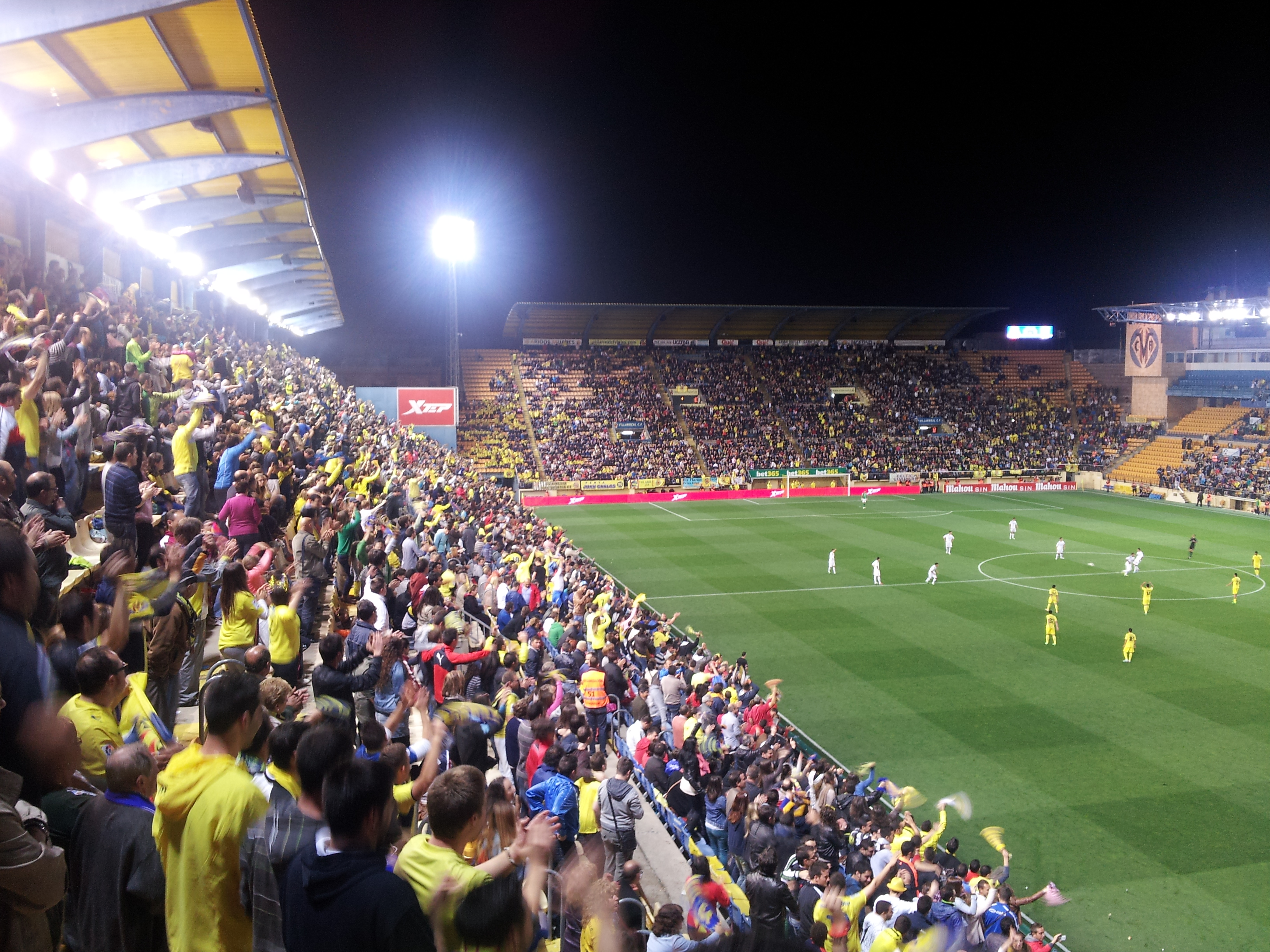 Cel·lebració del tercer gol del Villarreal (3-1) durant el partit de la jornada 40 del campinonat nacional de Lliga de la Segona Divisió 2012-13 a El Madrigal. El partit enfrontava al Villarreal CF i al Xerez CD i va finalitzar 3-2.